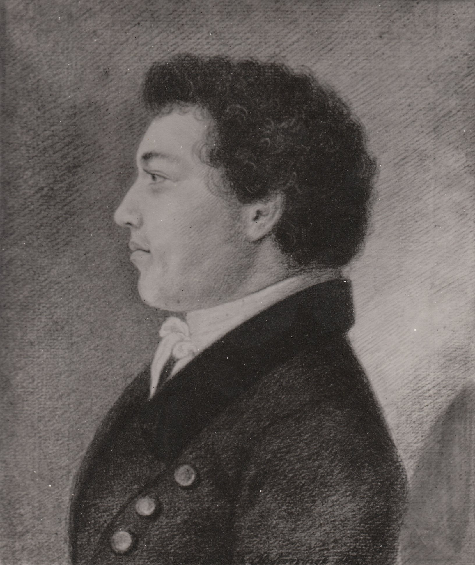 Fotopositiv. Avfotografert 1897 (?) Eier / Owner Institution: Trondheim byarkiv, The Municipal Archives of Trondheim Arkivreferanse / Archive reference: Tor.H41.B41.F3062